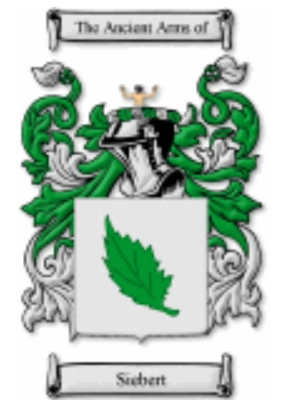 Siebert Family Shield